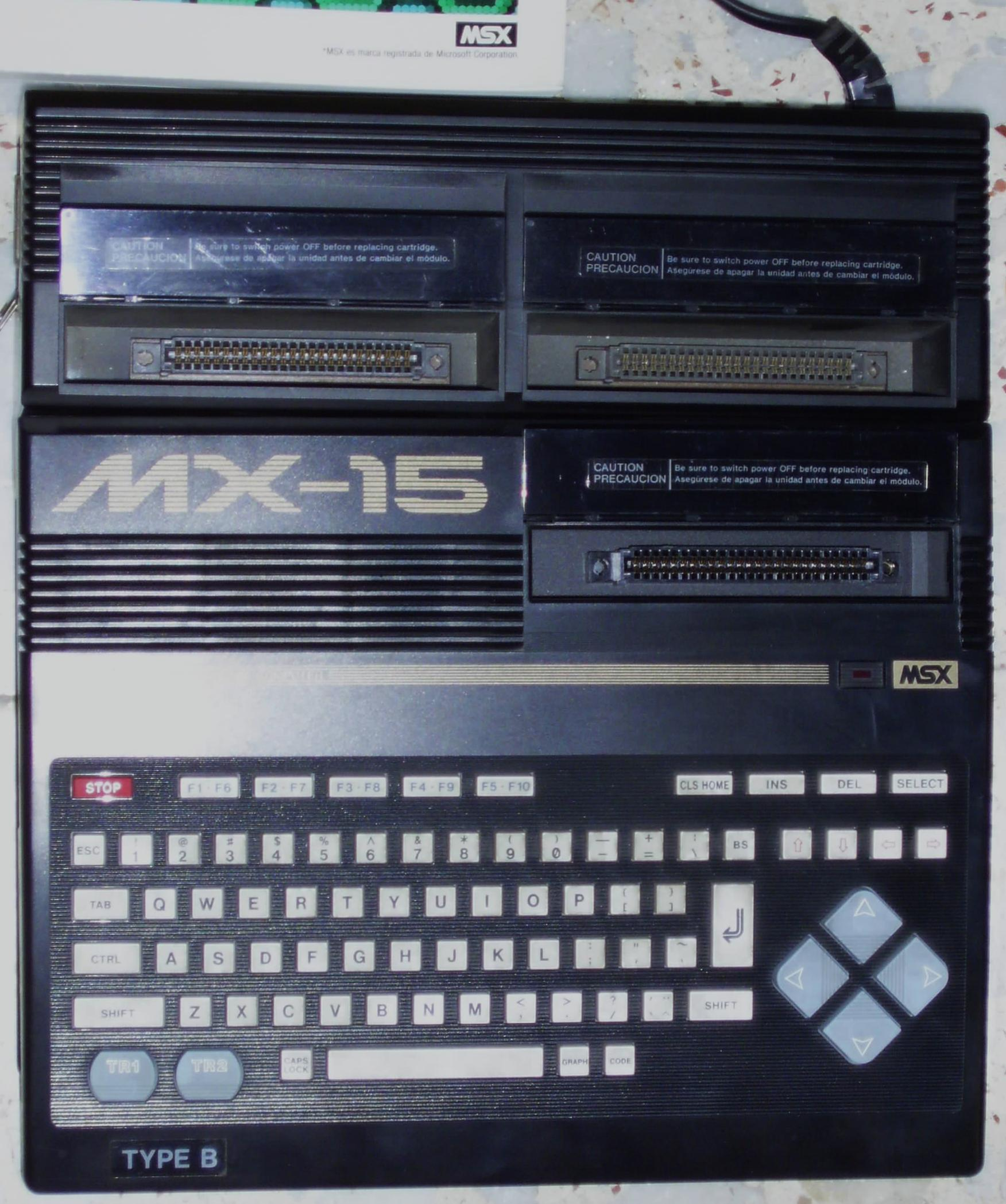 Ordenador Casio MX15 MSX-1 con expansor de slots. El equipo de la imagen es parte de la colección de Juan Jose Garcia Gonzalez , el mayor coleccionista de España de RetroInformática